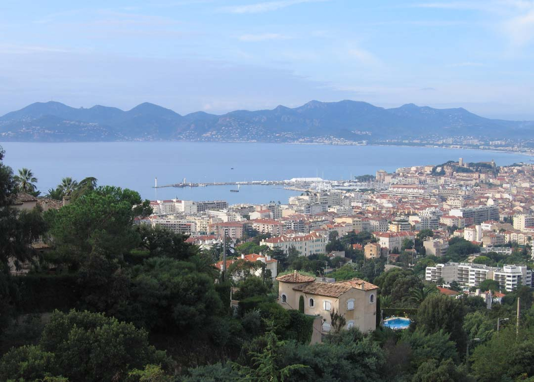 Cannes et la Massif de l'Estérel